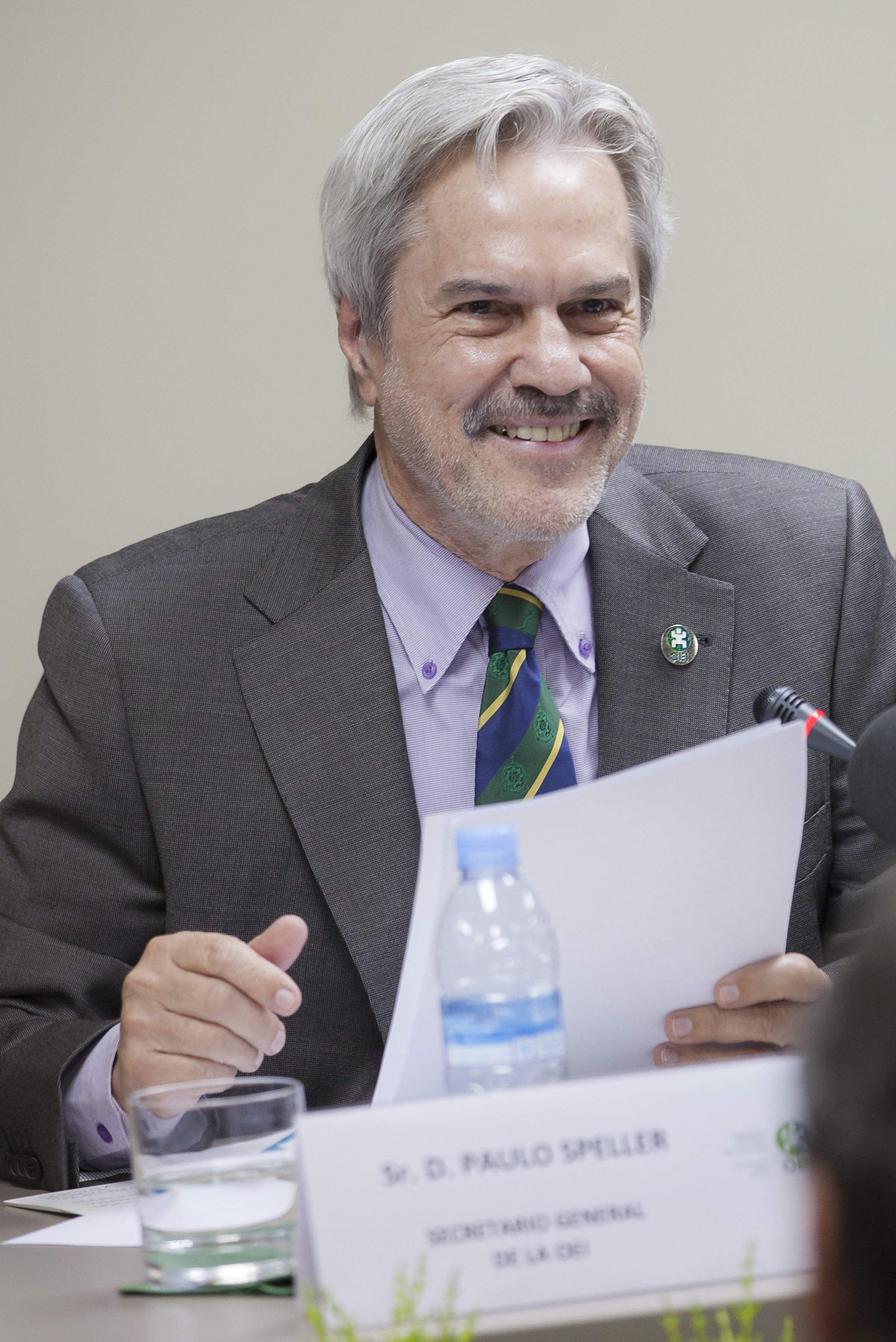 Imagen 2015